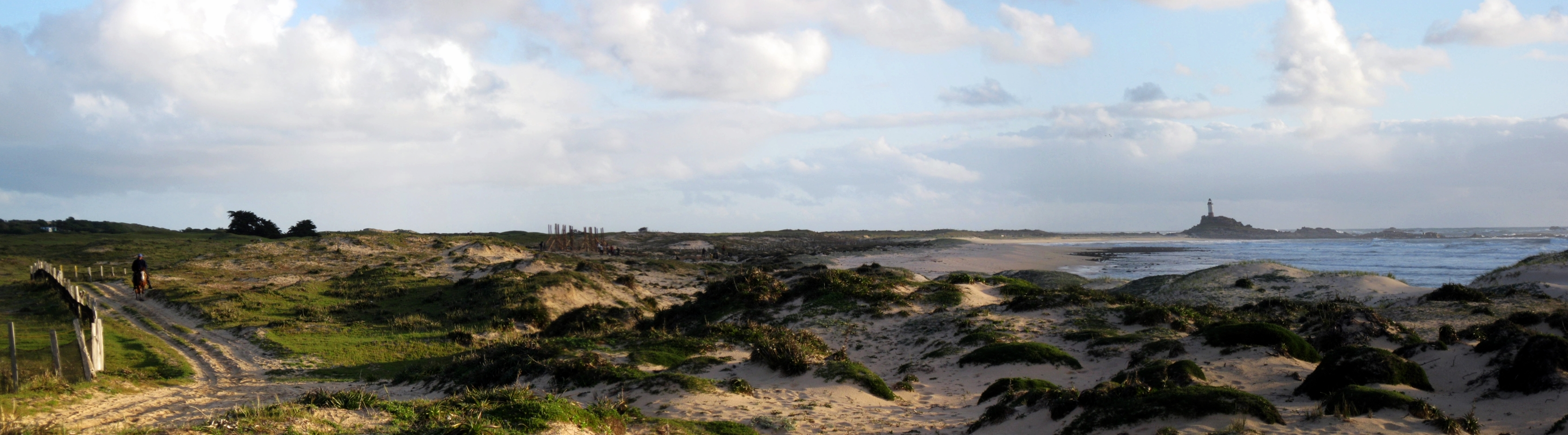 Fotografía tomada en Isla Mocha